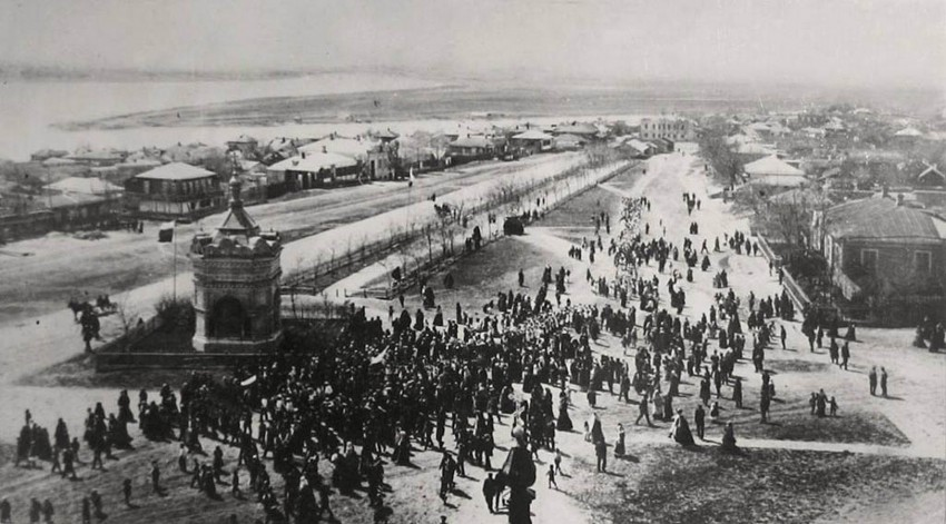 Ростов-на-Дону Часовня Аксайсокй Божией Матери, 1904г.